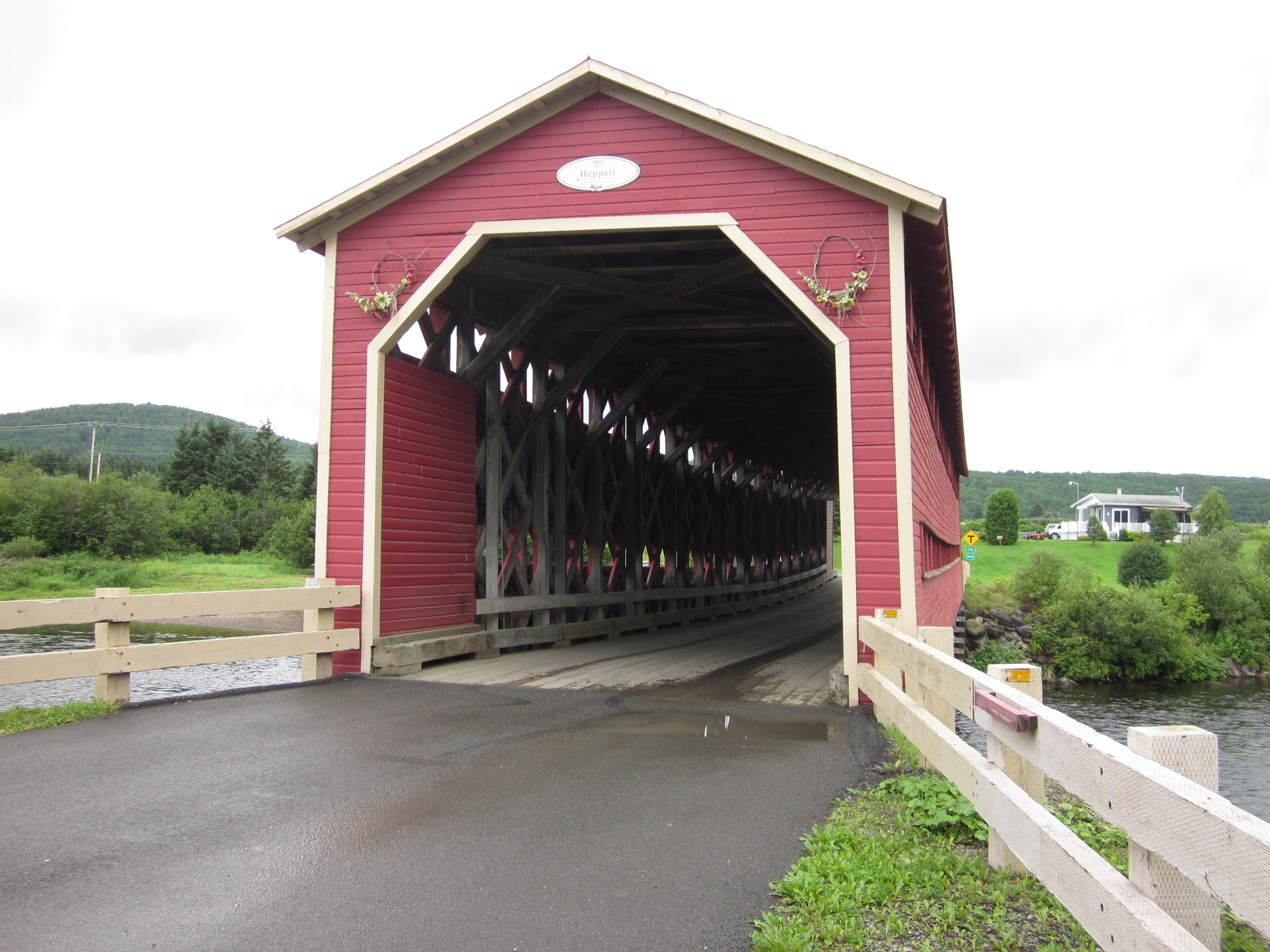 Pont Heppell vu de l'est